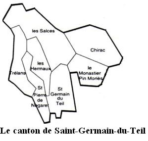 Le canton de Saint-Germain-du-Teil Image personnelle